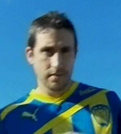 Juan Pablo Raponi, figura del Sportivo Luqueño